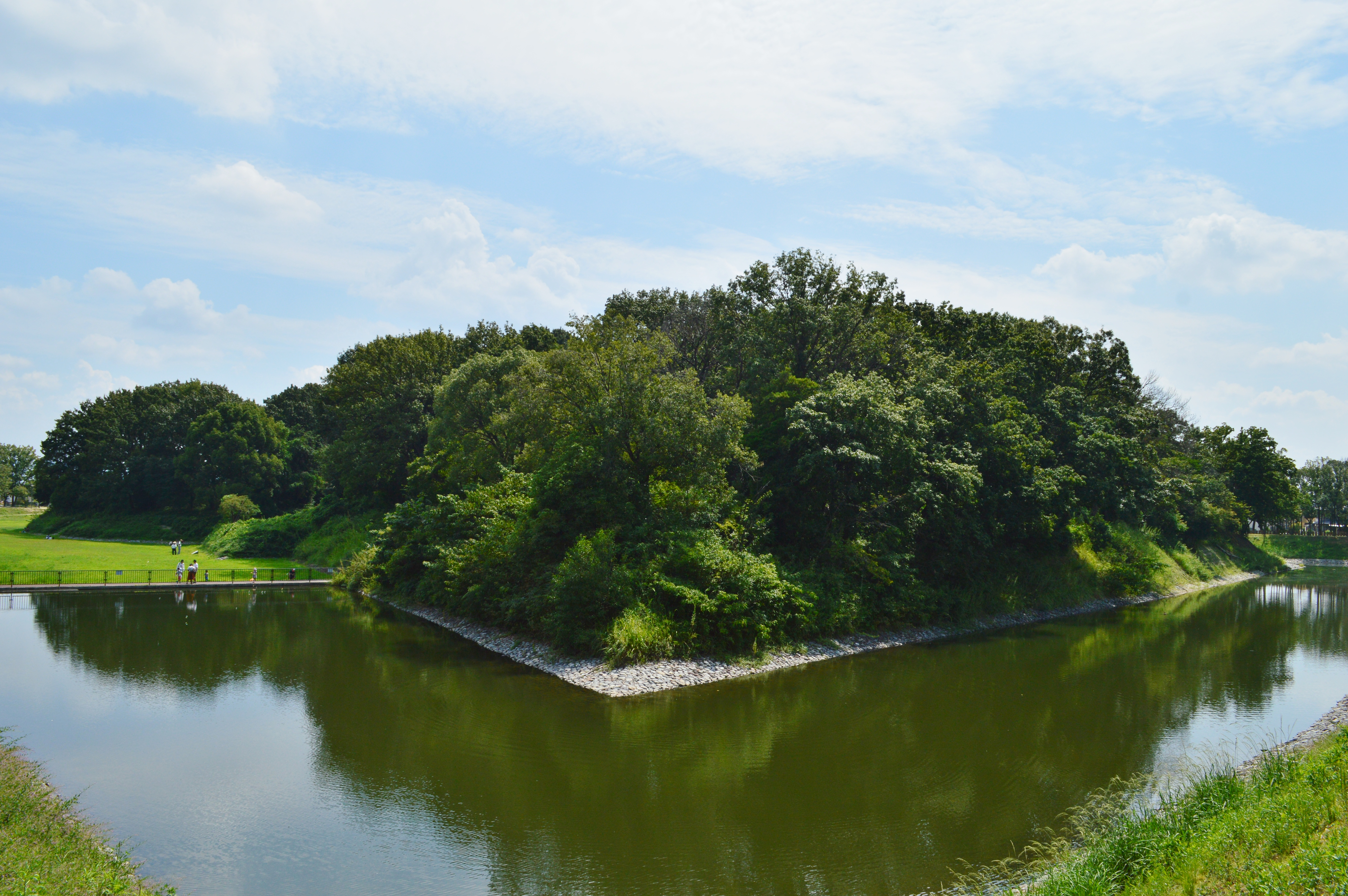 今城塚古墳 墳丘全景